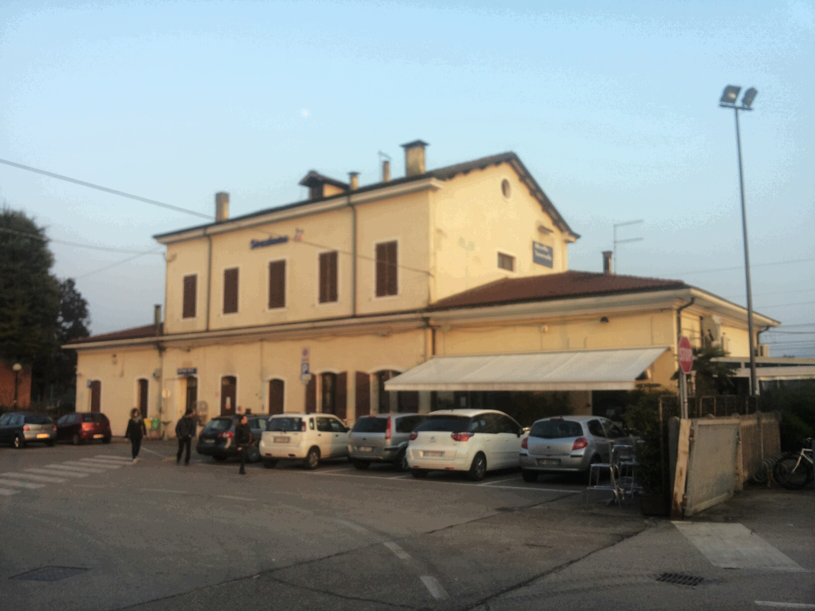 Stazione di Altavilla Tevernelle